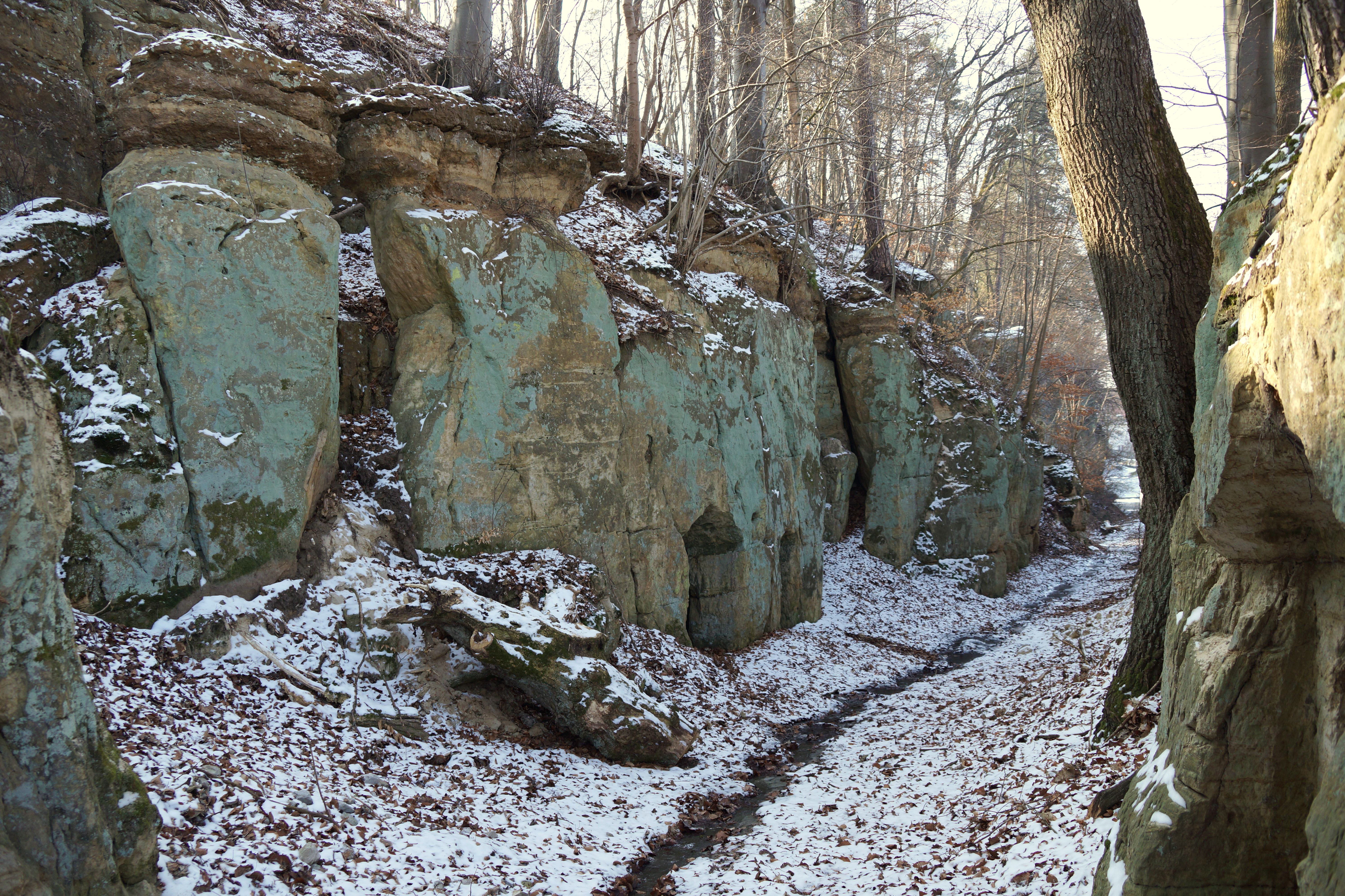 Die sogenannte Felsenschlucht mit Felsenkellern in Deining